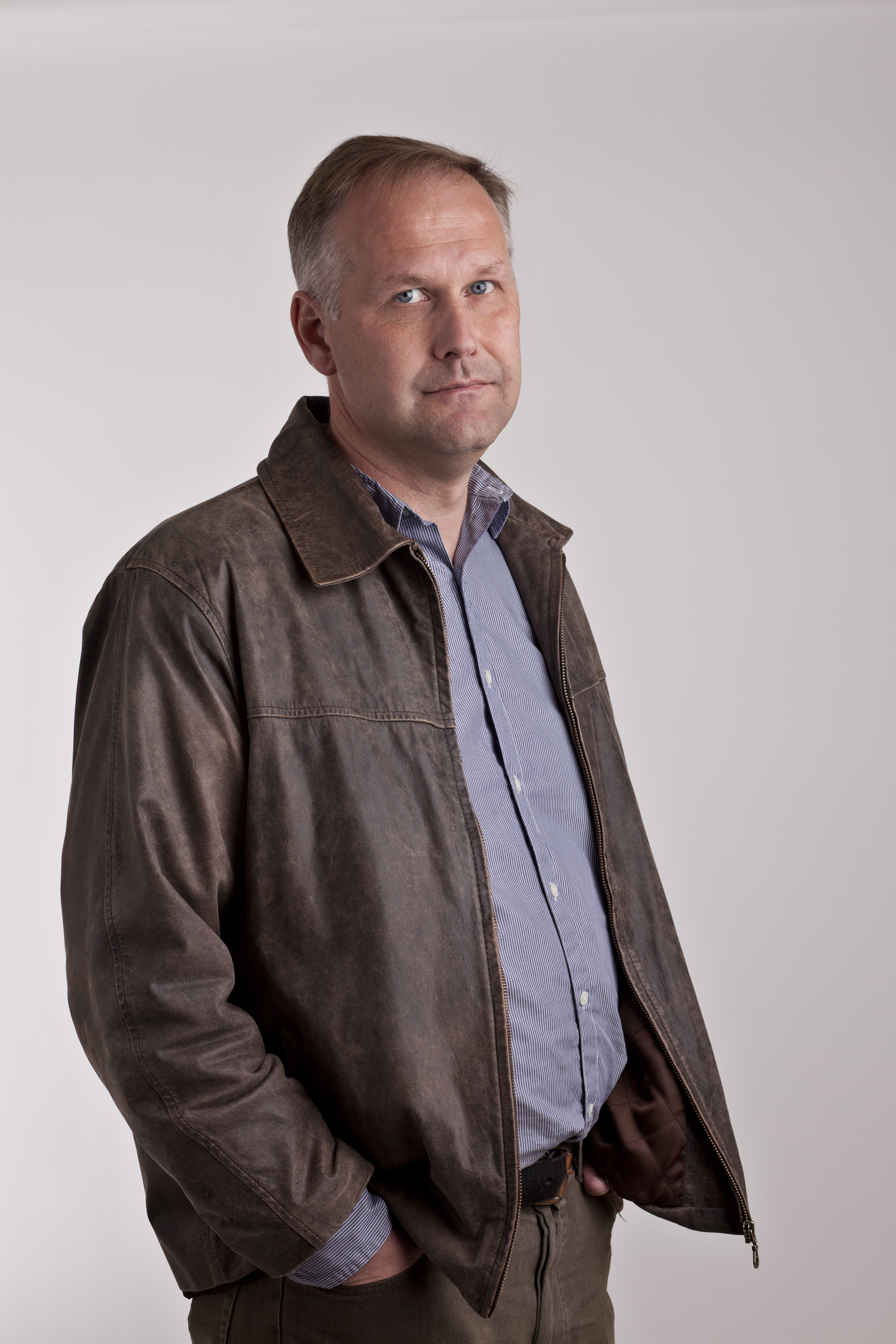 Jonas Sjöstedt, Vänsterpartiet.